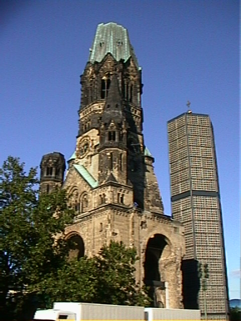 Kaiser-Wilhem-Gedächtnis-Kirche in Berlin, Germany